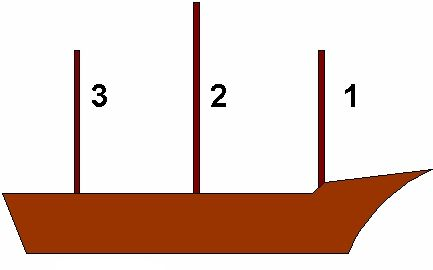 Fokkemast Grote mast Bezaan- of kruismast